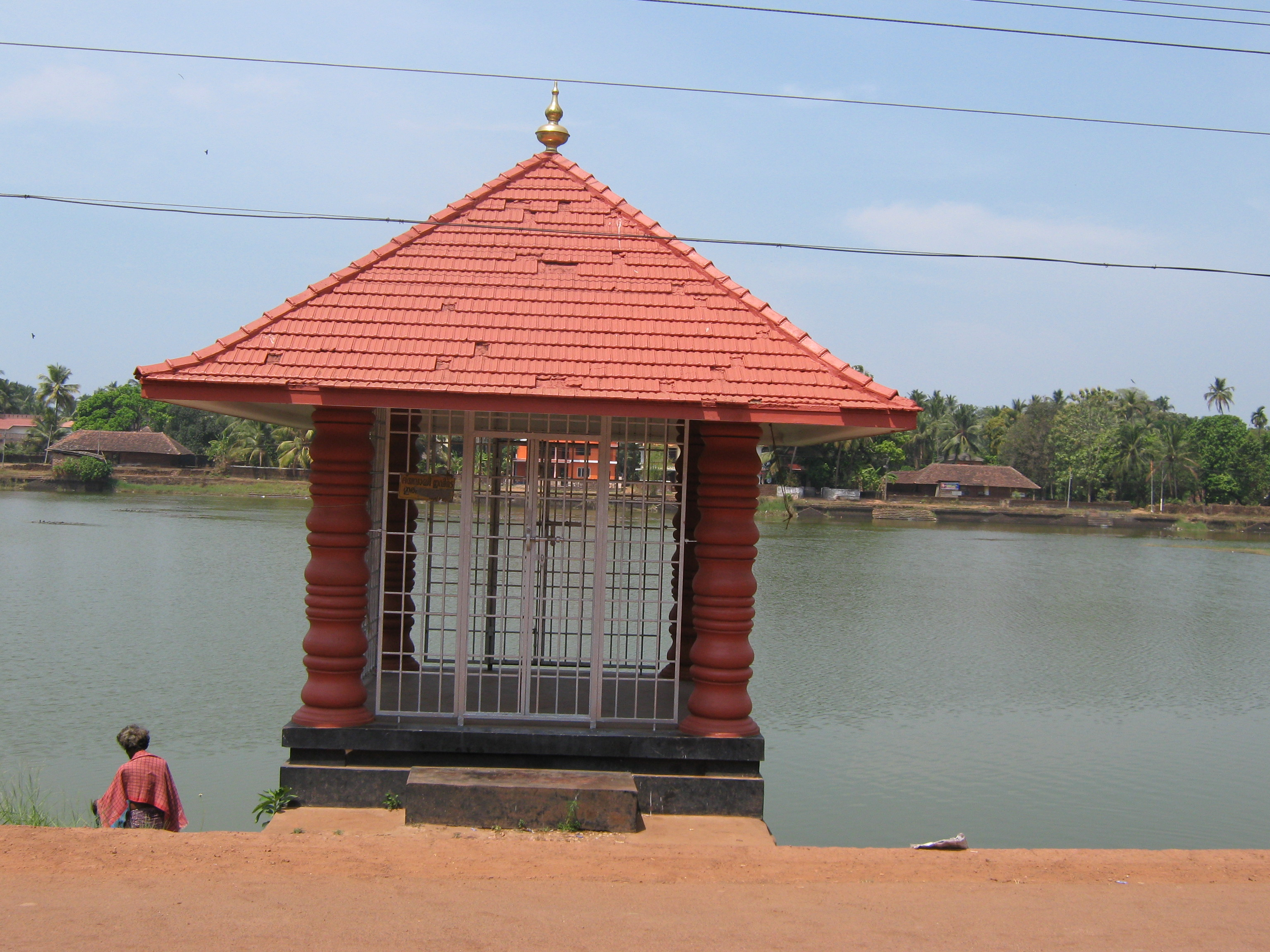 The Palace Pond, Chirakkal, Kannur, Kerala.